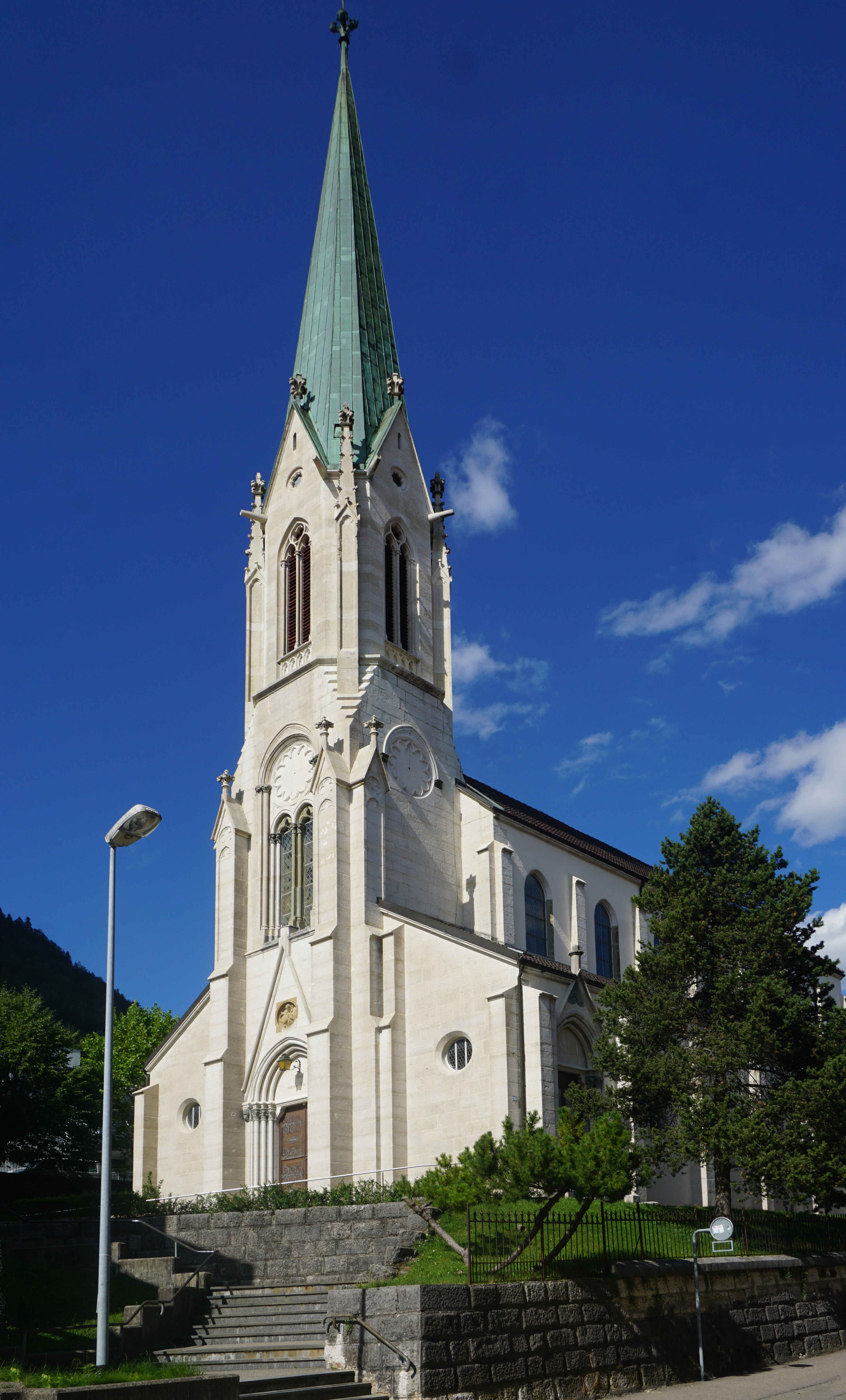 Saint-Martin Westfassade von unten